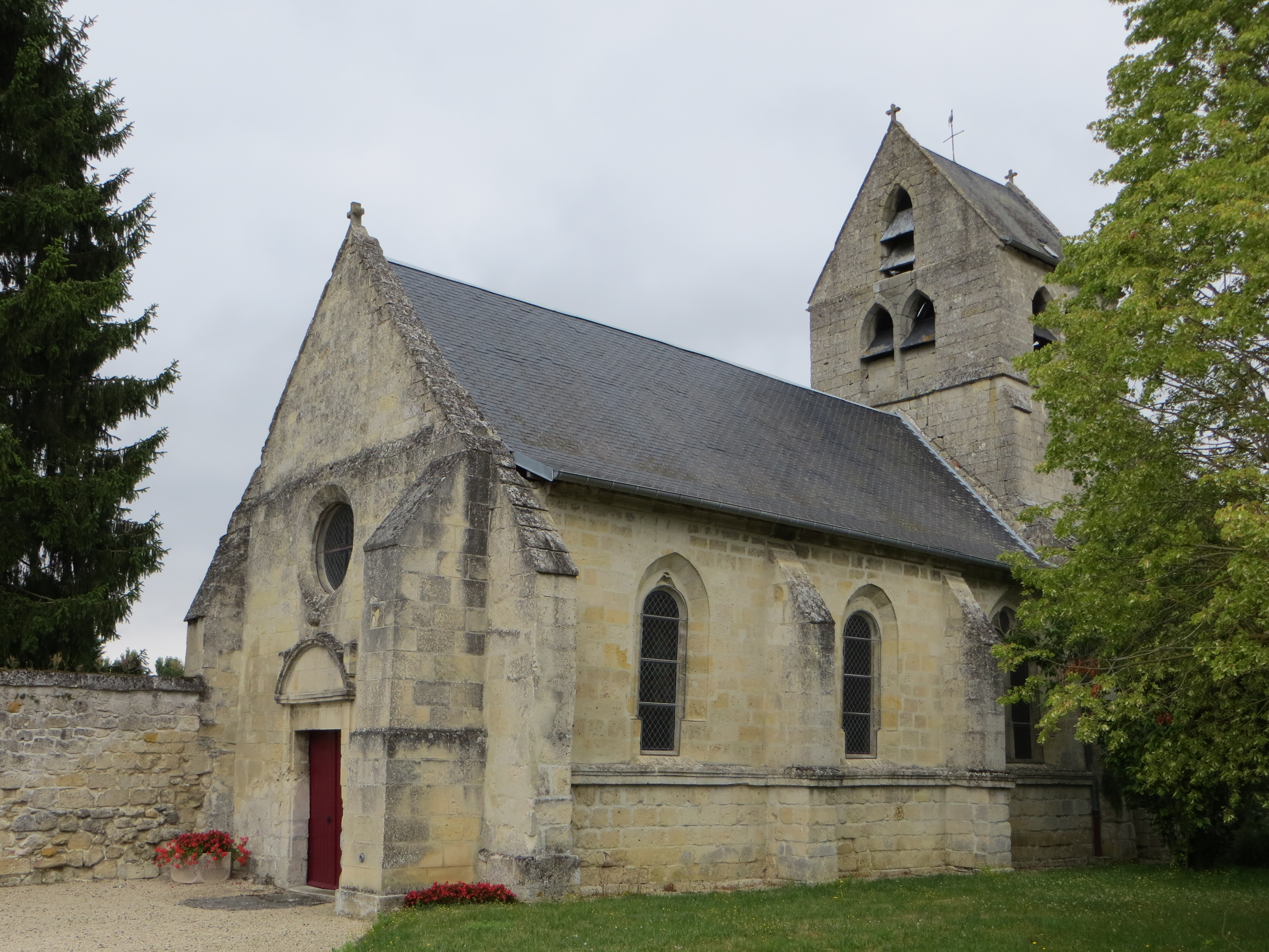 Vue générale de l'église